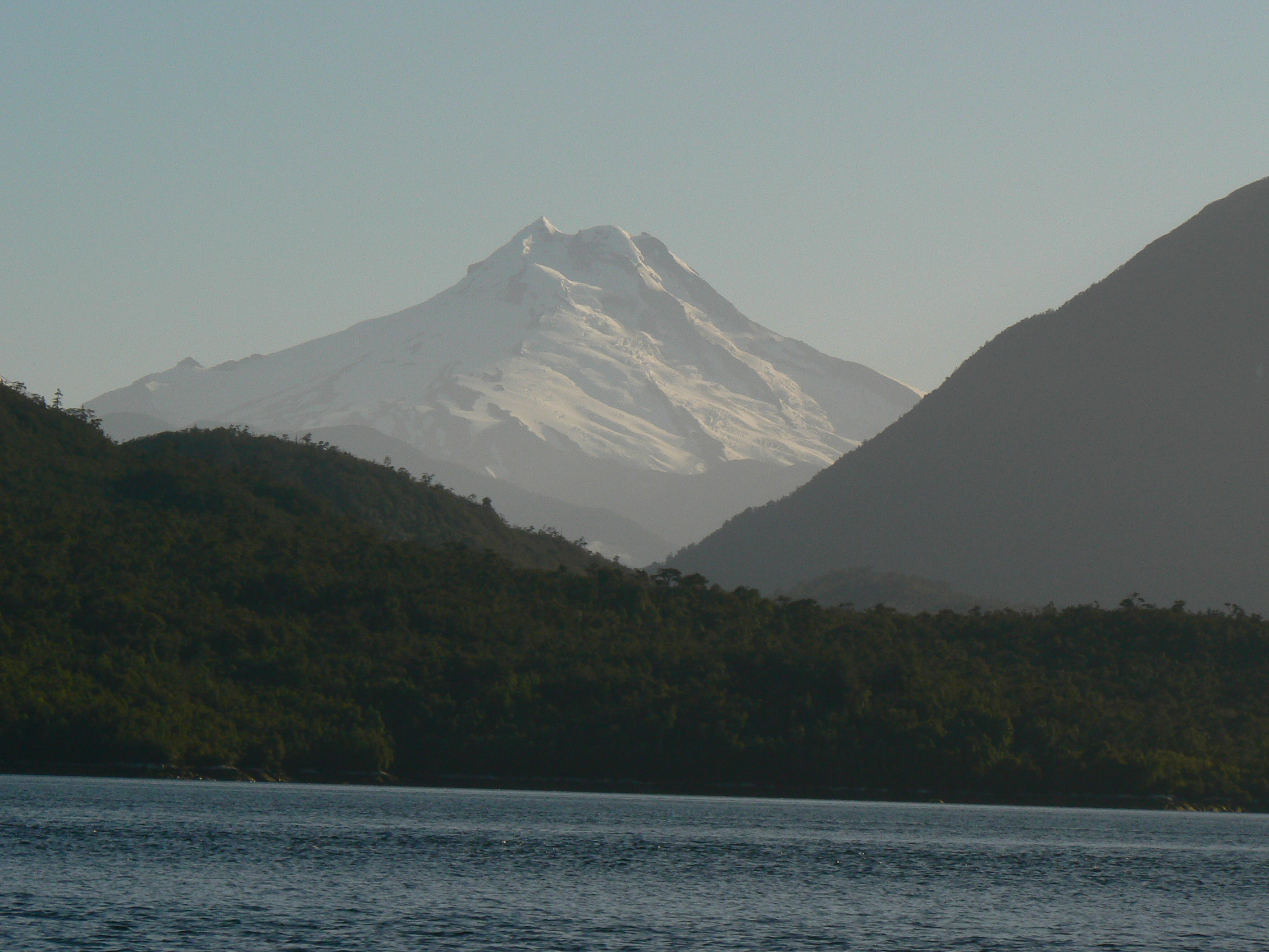 Volcán Macá, Chile.